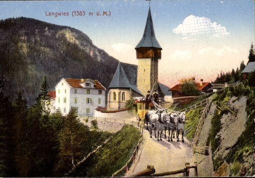 Kirche Langwies, Ansichtskarte von 1929